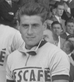 Collectie / Archief : Fotocollectie Anefo Reportage / Serie : [ onbekend ] Beschrijving : Start Ronde van Nederland Stadion Utrecht . Zwitserse ploeg (Nescafe) kopman Hugo Koblet Datum : 6 augustus 1956 Trefwoorden : wielrenners Instellingsnaam : Nestlé Fotograaf : Pot, Harry / Anefo Auteursrechthebbende : Nationaal Archief Materiaalsoort : Negatief (zwart/wit) Nummer archiefinventaris : bekijk toegang 2.24.01.04 Bestanddeelnummer : 907-9294